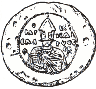 Найбільш достовірне (прижиттєве) зображення князя Ярослава Володимировича зображено на його печатці